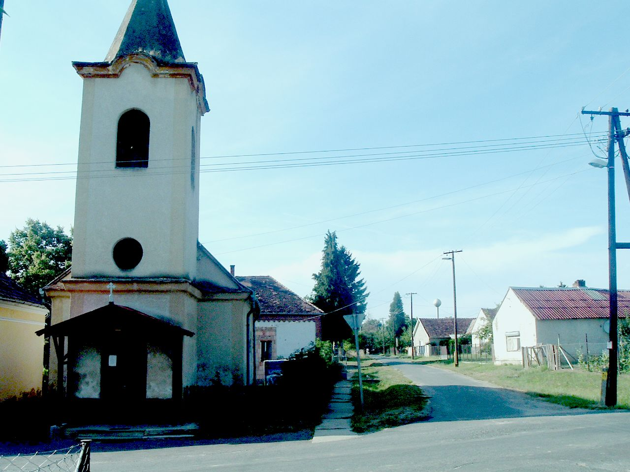 Church in Alsótelekes, Telekes. Szentháromság római katolikus templom